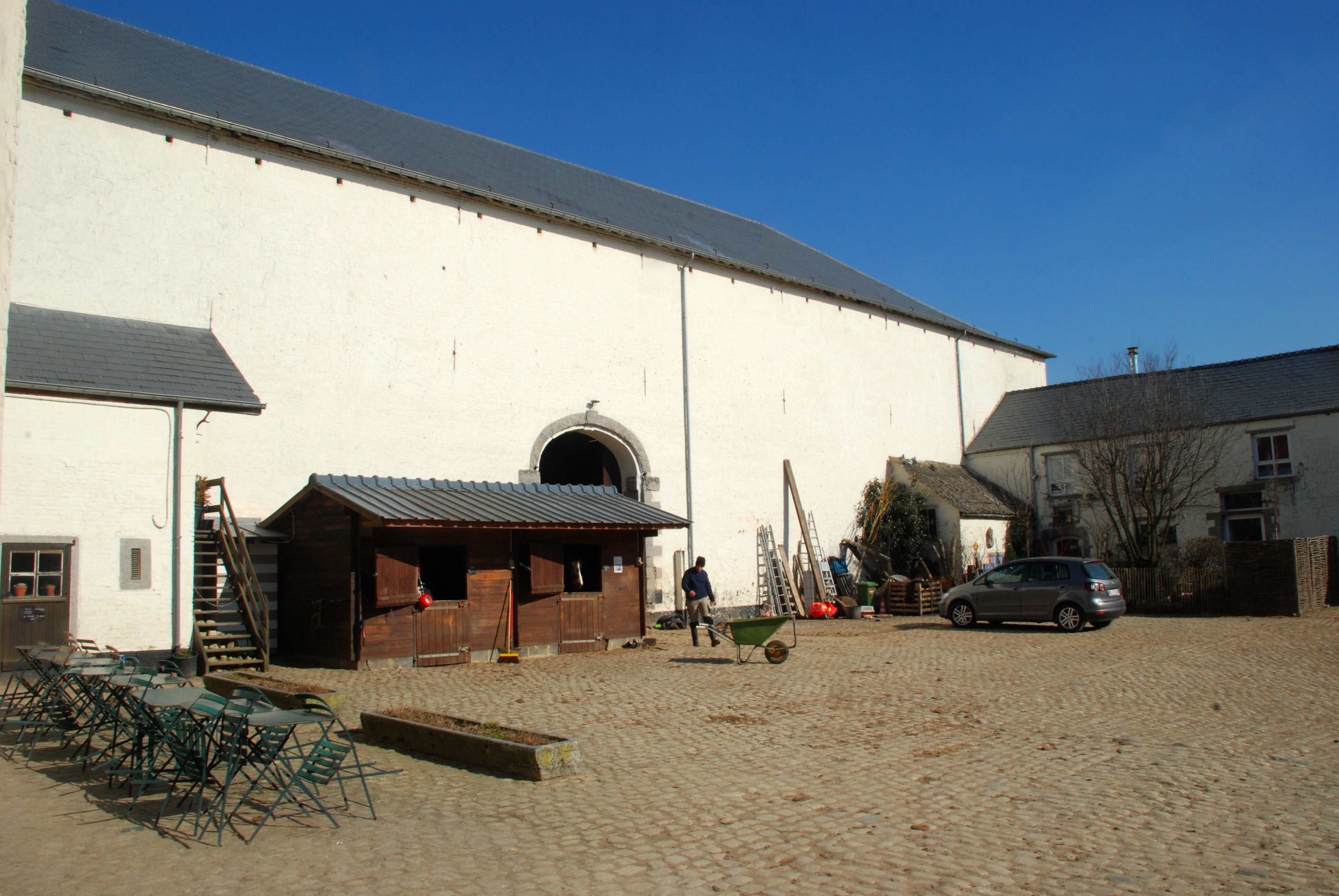 Belgique - Brabant wallon - Site de la bataille de Waterloo - Ferme de la Papelotte